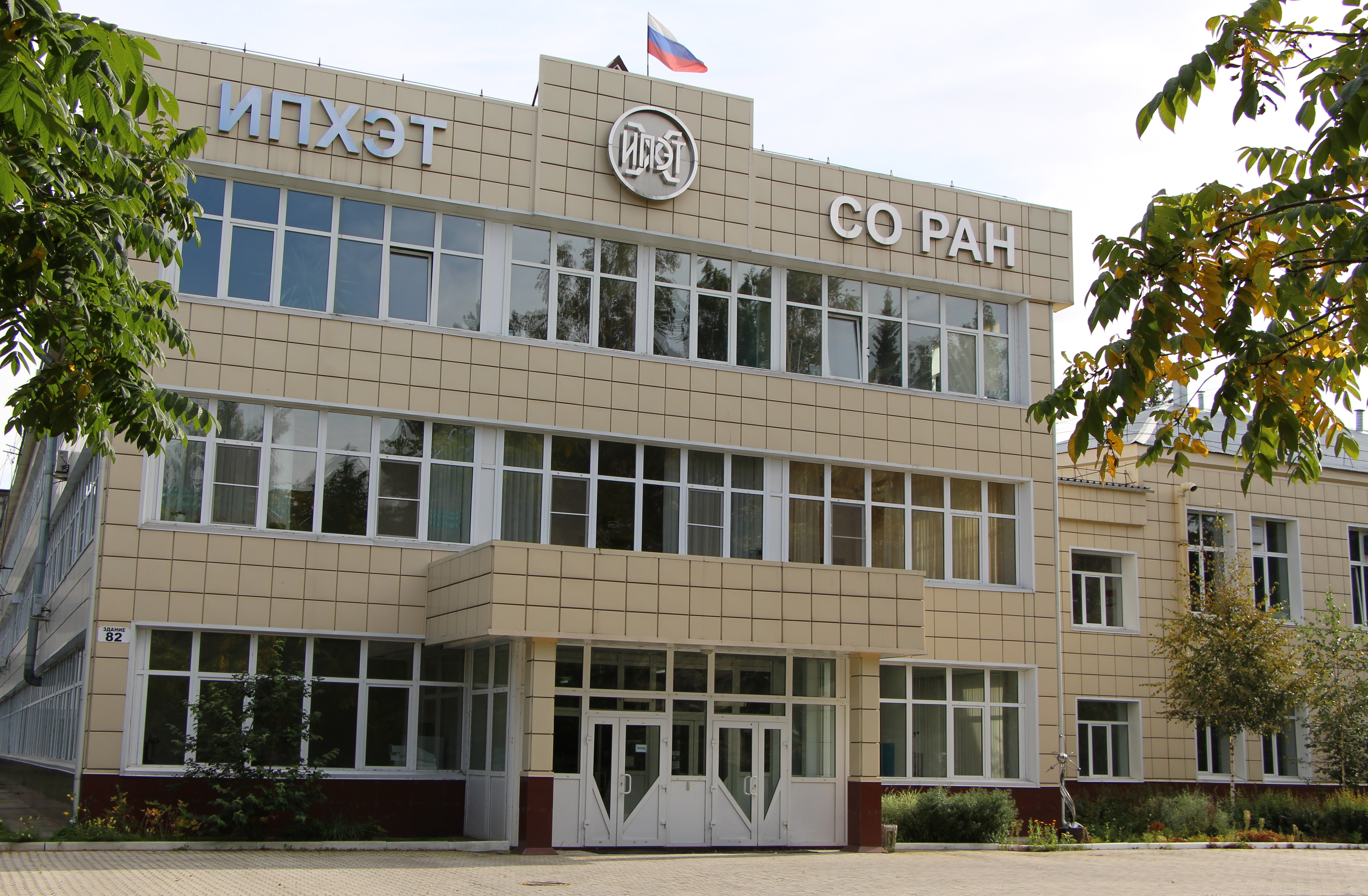 Главный фасад здания Федерального государственного бюджетного учреждения науки Института проблем химико-энергетических технологий Сибирского отделения Российской академии наук